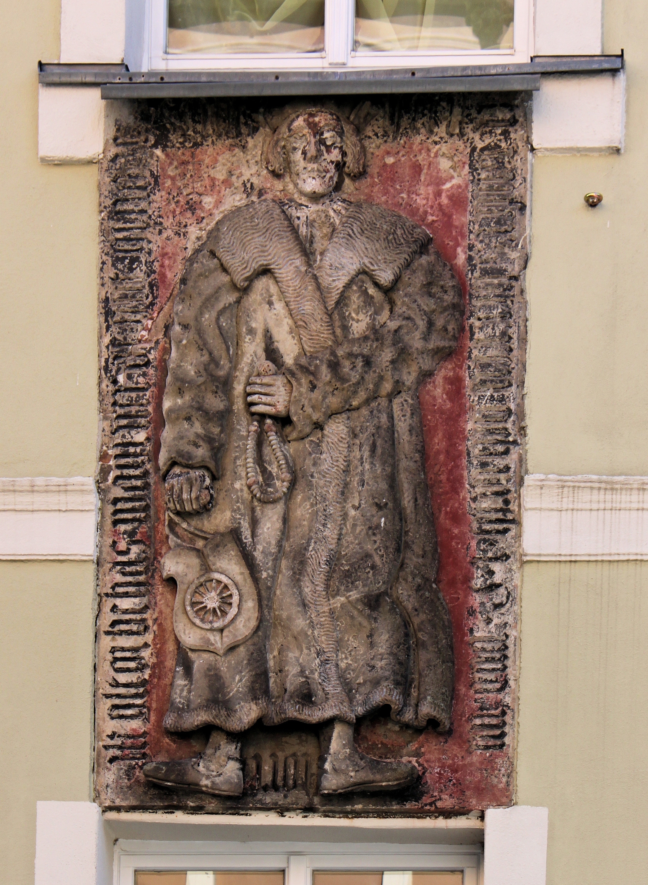 Der Mönch, Kamenz. Die Grabplatte in der Nähe des Kamenzer Markts aus dem 16. Jh. erinnert an Hans Wagner in pelzgefütterter Ratsherrentracht; er war Oberältester der Schuhmacherinnung und stiftete den Annenaltar in der Klosterkirche; er unterstützte wahrscheinlich die Entwicklung des Klosters und erhielt so die Bezeichnung "Mönch". Am Eckhause der inneren Bautzener Straße und der Oberanger Gasse in Kamenz ist eine türgroße Steinplatte eingemauert. Auf derselben sind das Bildnis eines Mönches in schwarzer Kutte und das Wappen des Erzbistumes Mainz, ein Rad, ausgehauen. In der Hand hält der Mönch den Rosenkranz. Die Schrift, von welcher die Figur umgeben ist, ist sogenannte Mönchsschrift und als solche schon nicht leicht zu enträtseln. Sie besagt, daß diese eingemauerte Steinplatte der Leichenstein des Ratsherrn und Schuhmacherältesten Hans Wagner gewesen ist, der einst in diesem Hause wohnte und als Eigentum es besaß. Die Umschrift lautet: „Nach Christi unsers Herren Geburth 1500 und im 4ten Jare ist gestorbe Hans Wagner dem Got gnade.“ Der Volksmund nennt die an jenem Hause befindliche Figur den „Mönch“ und hält sie für das Standbild des Mönches Berthold Schwarz, des Erfinders des Schießpulvers. Einen in der Sankt Annenkirche zu Kamenz befindlichen Grabstein, den eine Kanone zieret, hält man für den Grabstein desselben. Jene Grabstätte in der Wendischen Kirche, die man auch die Sankt Annenkirche nennt, ist aber die eines Kamenzer Büchsenmachers, mit Namen Max Gottmann, der im Jahre 1508 starb und in der Sankt Annenkirche, der ehemaligen Klosterkirche von Kamenz, begraben liegt. Quelle:Friedrich Bernhard Störzner: Was die Heimat erzählt. Sagen, geschichtliche Bilder und denkwürdige Begebenheiten aus Sachsen, S. 261